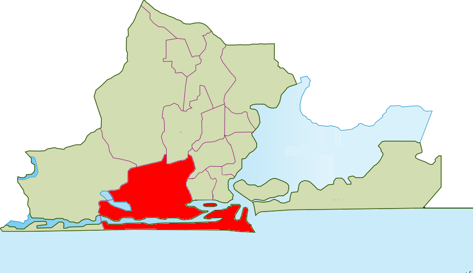 Mapa de Amuwo Odofin, Lagos